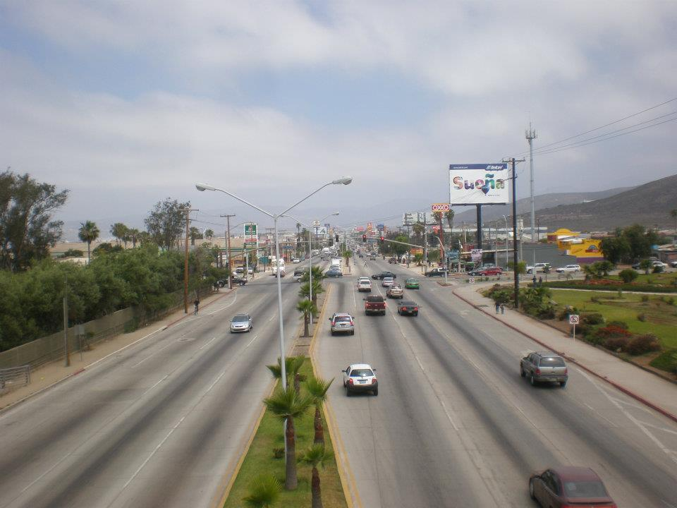 Principal vialidad de la ciudad de Ensenada